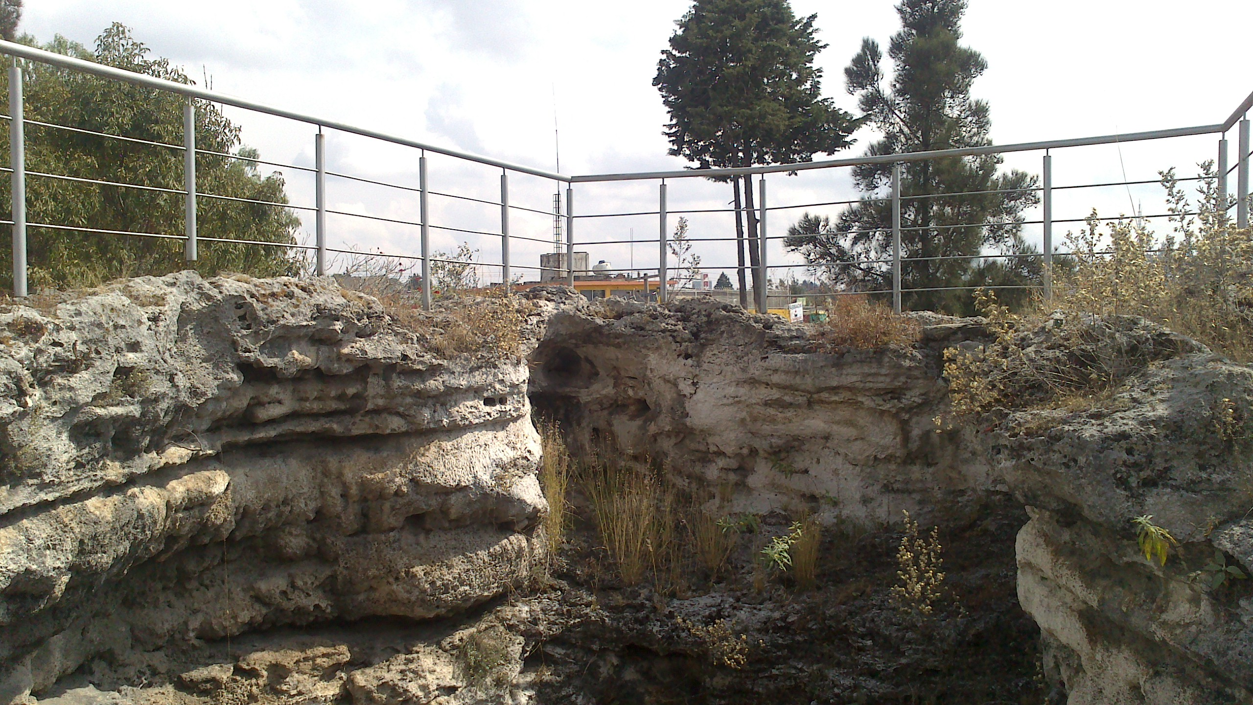 Cima del Volcán Cuexcomate vista desde la escalera interior, Puebla, Mëxico.